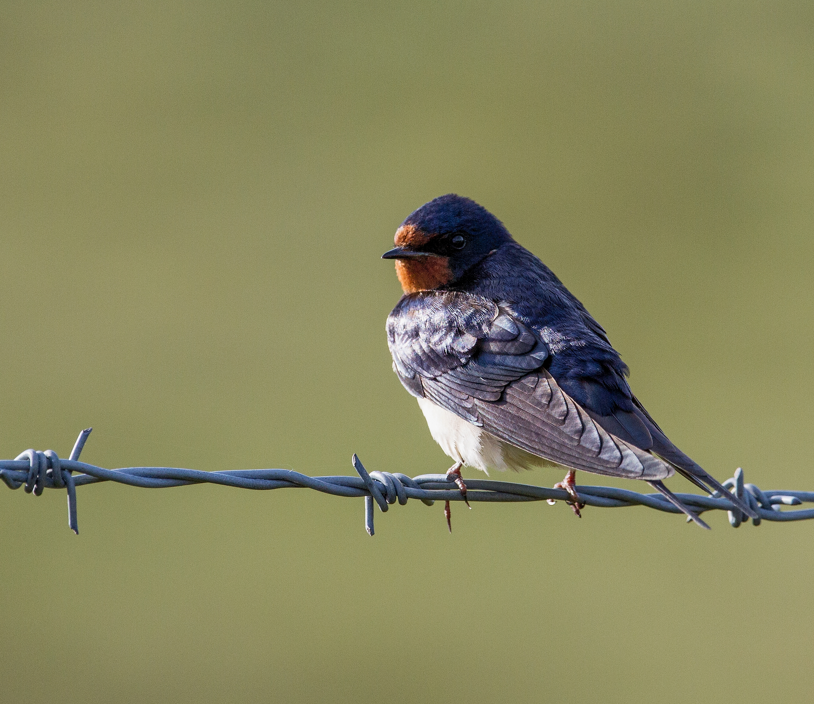 gwennol, Nebo, LLanrwst